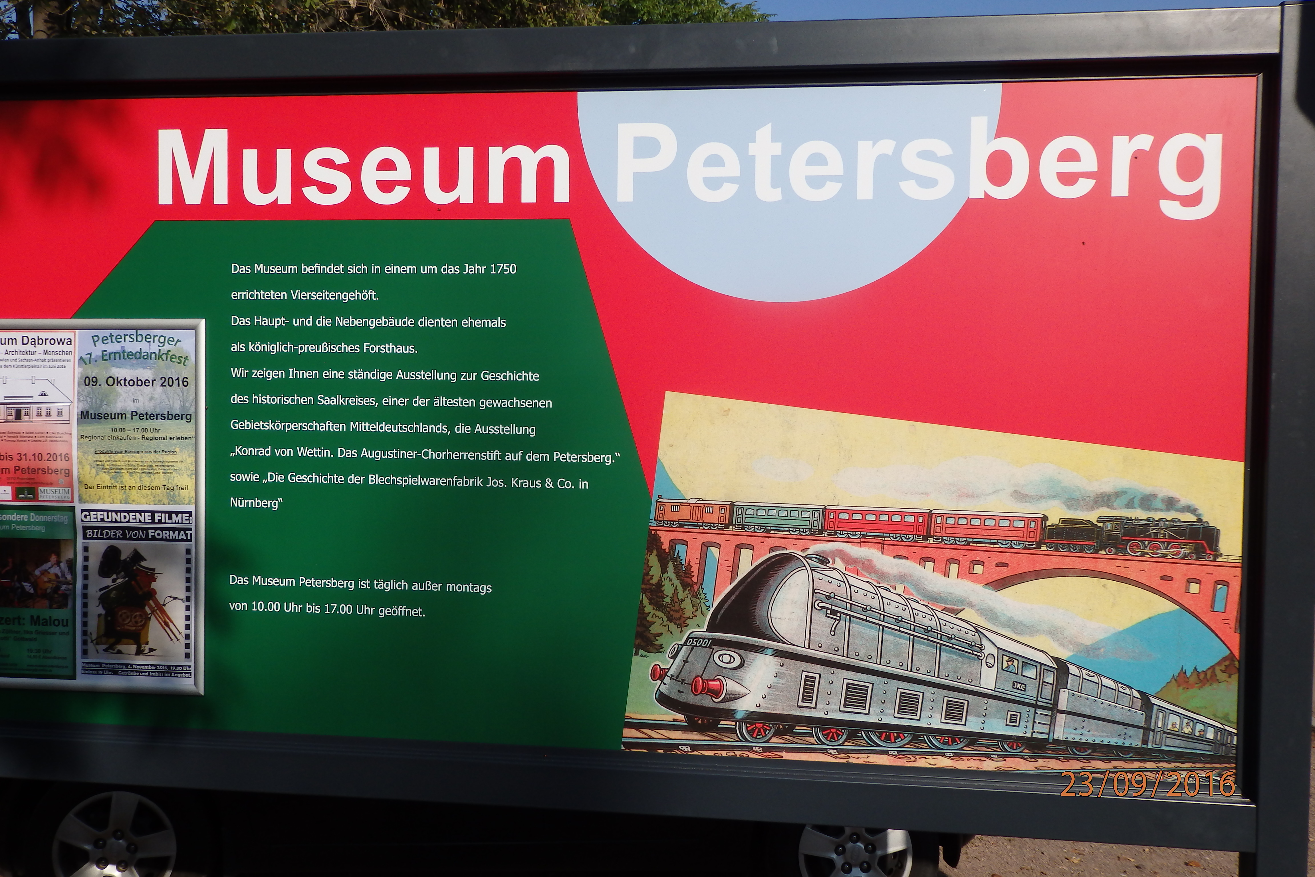 Schild Museum Petersberg